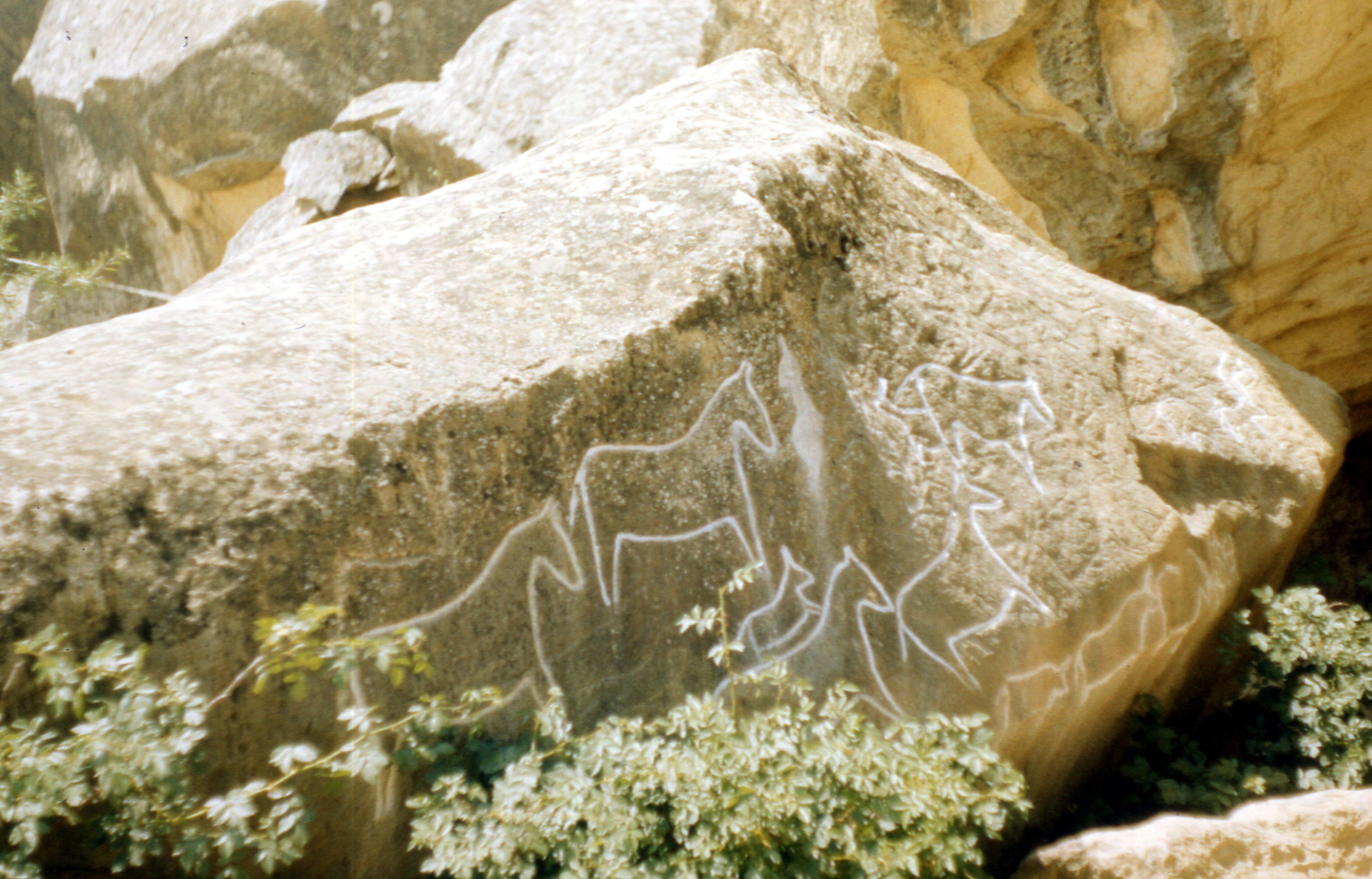 Aserbaidschan 1987